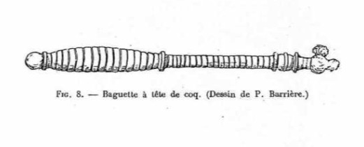 Cassinomagus (Chassenon), Charente, France. Bâton (probable quenouille) avec coq sculpté au bout, trouvé dans le puits n° 12 du champ des Coutis (lieu de trouvaille donné dans Barrière (1937), « Une bourgade gallo-romaine : Chassenon, ses monuments et ses puits », p. 252).